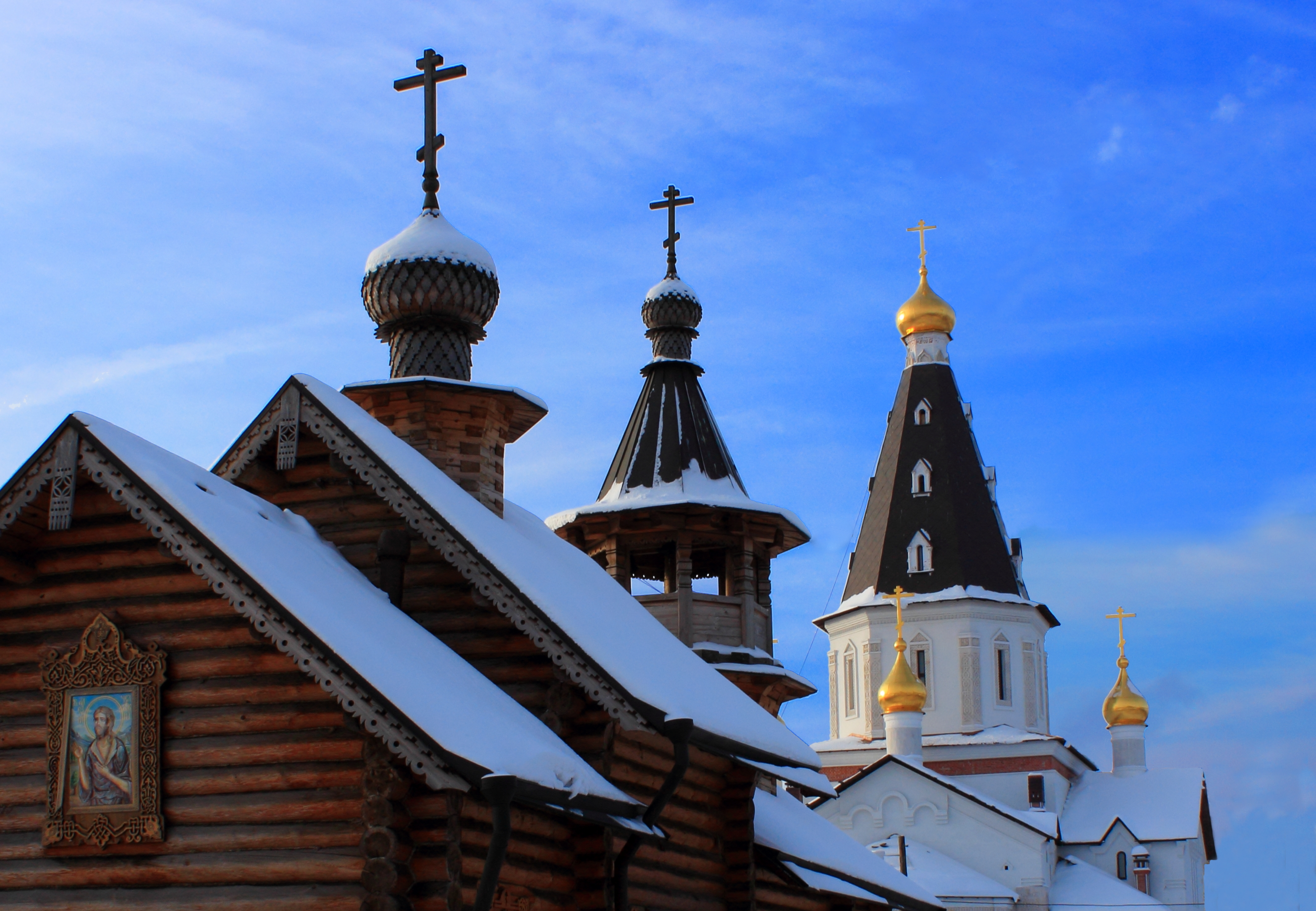 Храм в честь блаженной Ксении Петербургской в Медвежьих Озерах, Московской области.